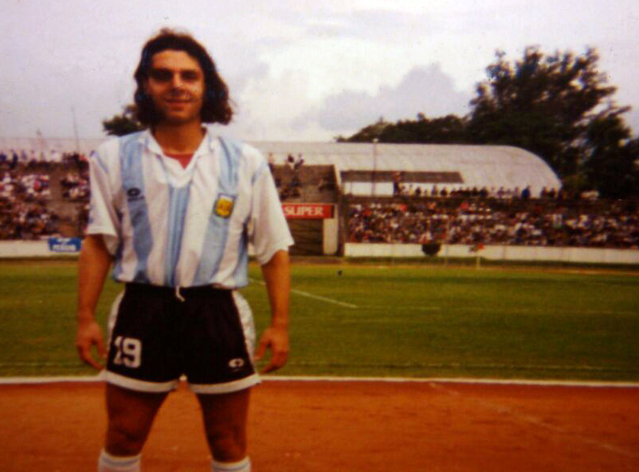 Marcelo Messina jugando por Argentina en Indonesia